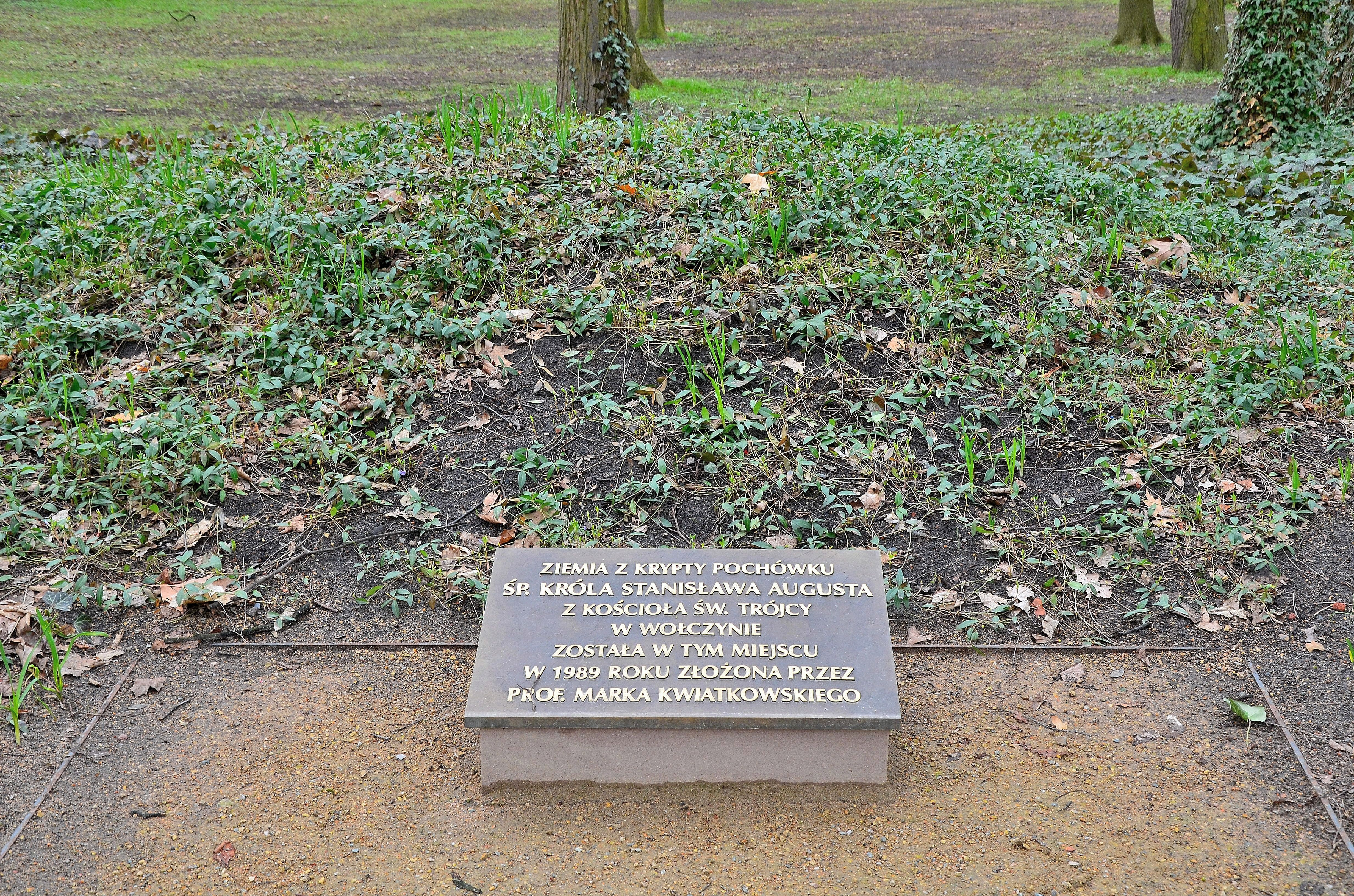 Miejsce rozsypania ziemi z krypty pochówku Stanisława Augusta Poniatowskiego w kościele Św. Trójcy w Wołczynie w Łazienkach Królewskich w Warszawie